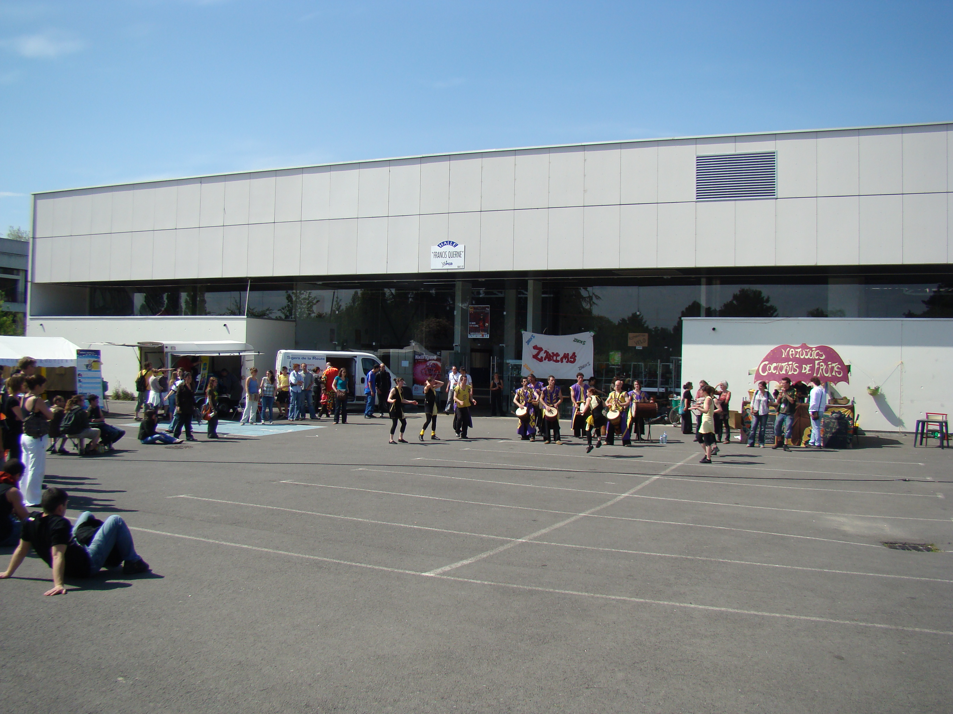 Les "Zanims" sur le parking de la halle des Sports de l'INSA de Rennes.